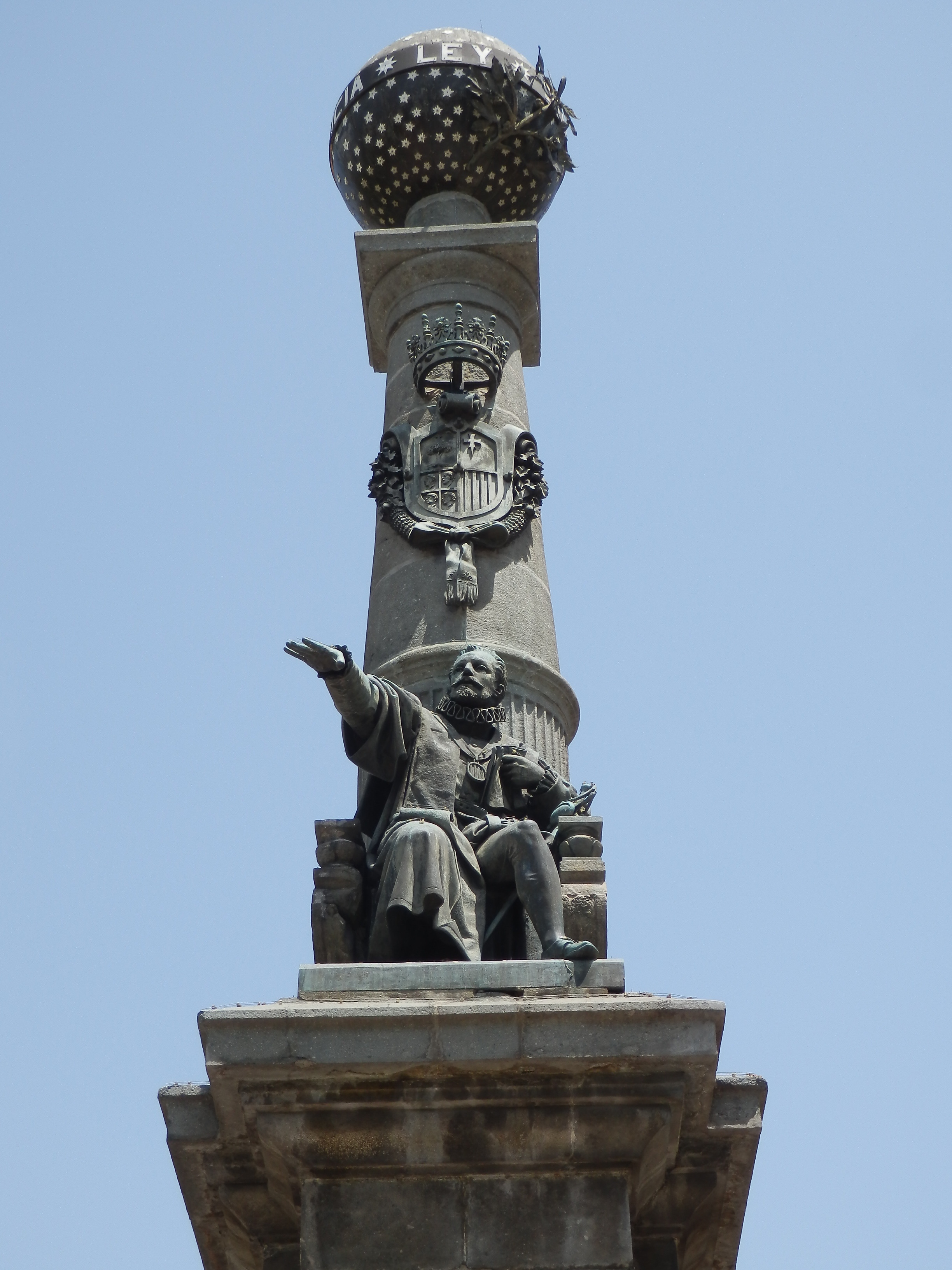 Monumento al Justiciazgo. Estatua de Don Juan V de Lanuza, Justicia Mayor de Aragón ajusticiado en 1591 por orden de Felipe II